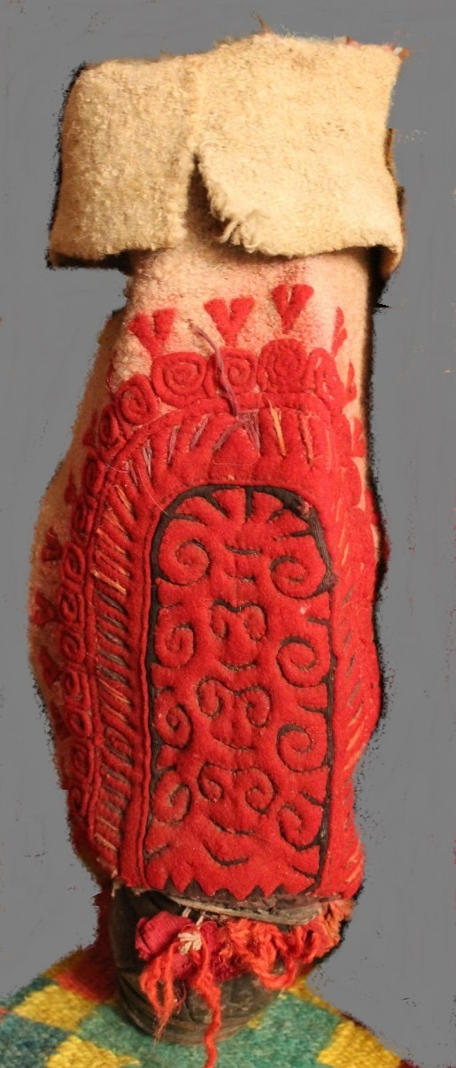 Башҡорттарҙың милли аяҡ кейеме - сарыҡ